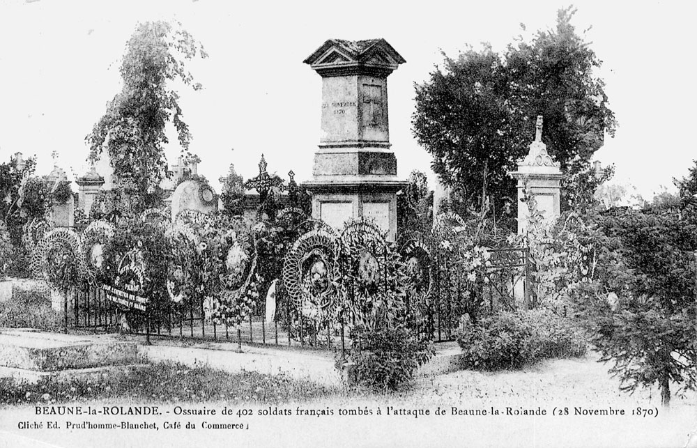 Ossuaire de soldats français tués au combat le 28 novembre 1870, Beaune-la-Rolande, Loiret, France